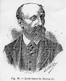 Louis Ducos du Hauron, French pioneer of color photography